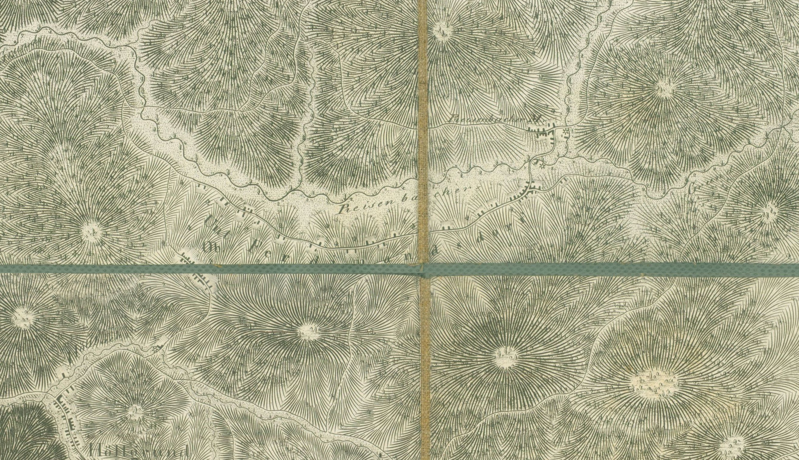 Montage und anschließender Zuschnitt aus Blatt 20 und 24 der Haas´schen Karte mit dem um 1850 aufgelösten Doppelweiler Ferdinandsdorf. Die Reisenbacher Mühle nördlich des Reisenbaches gehörte zu Kurmainz und damit weder zu Ober- noch zu Unterferdinandsdorf (Herrschaft Zwingenberg/Kurpfalz). ACHTUNG die Karte muss etwa 30° im Uhrzeigersinn gedreht werden, damit Norden oben ist.